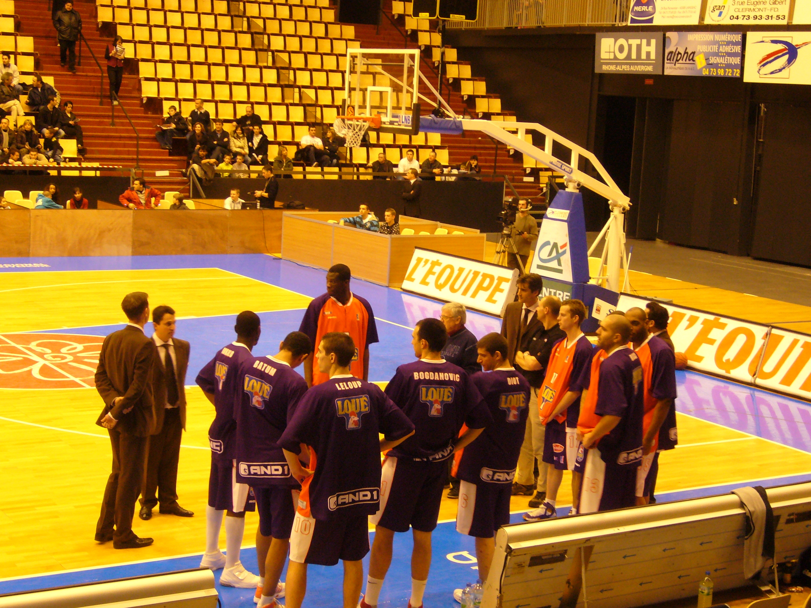 L'équipe du Mans Sarthe Basket (à Clermont-Ferrand)